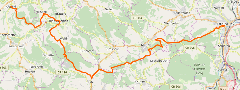 Tracé du Sentier pédestre national du Préizerdaul